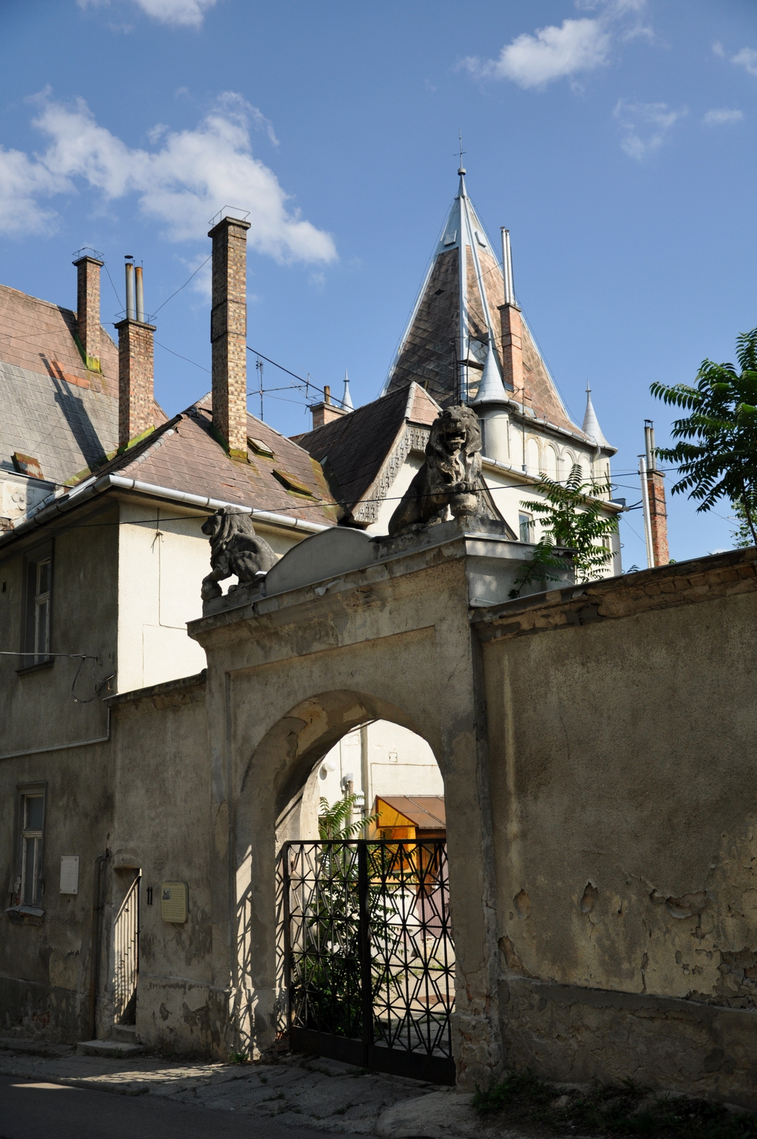 Czuba-Durozier-kastély, Budafok, Budapest